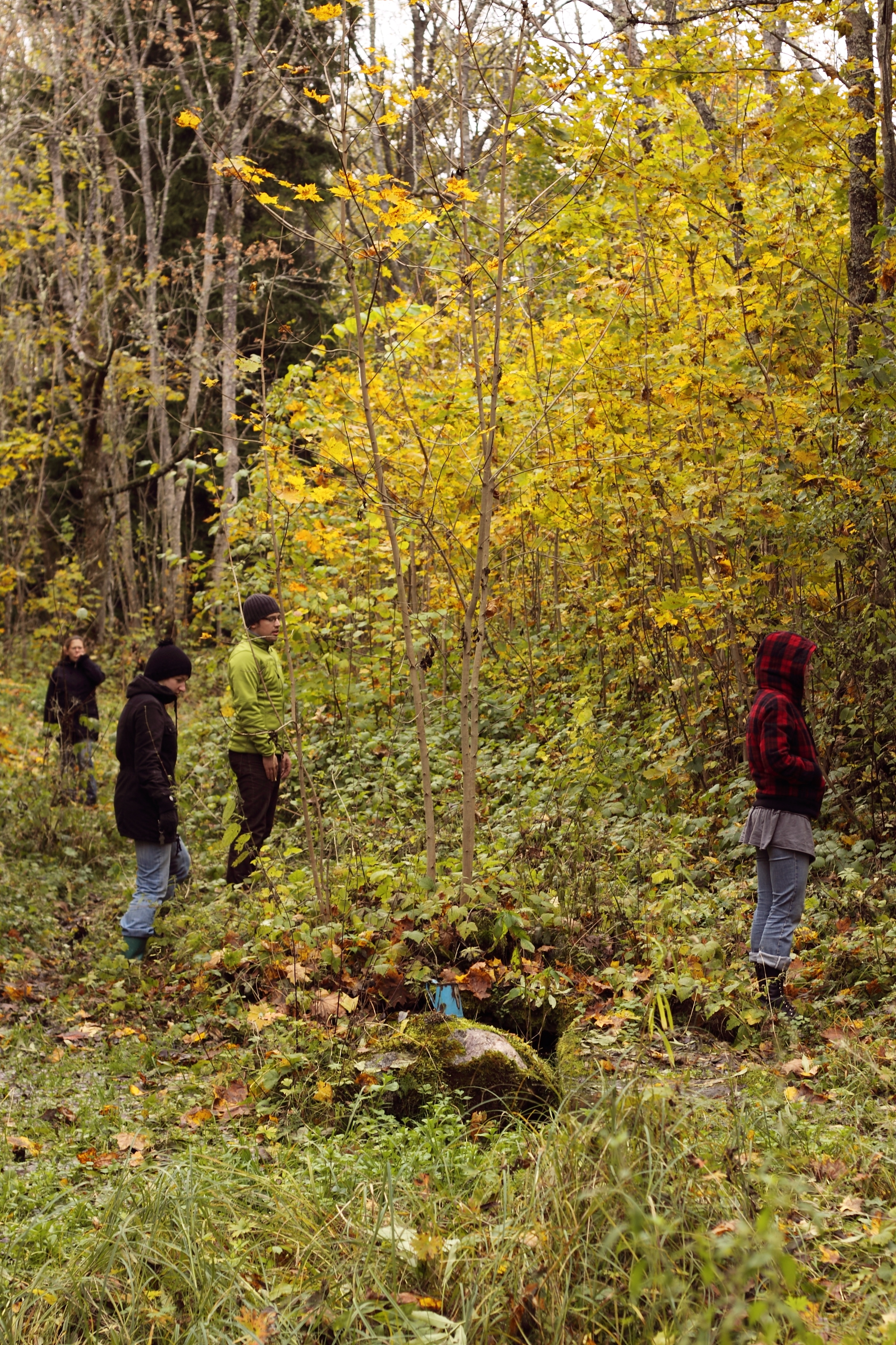 Kurese allikas 2009 aasta oktoobris. Allika ümbrust toetas paekividest laotud pesa paari suurema kiviga.